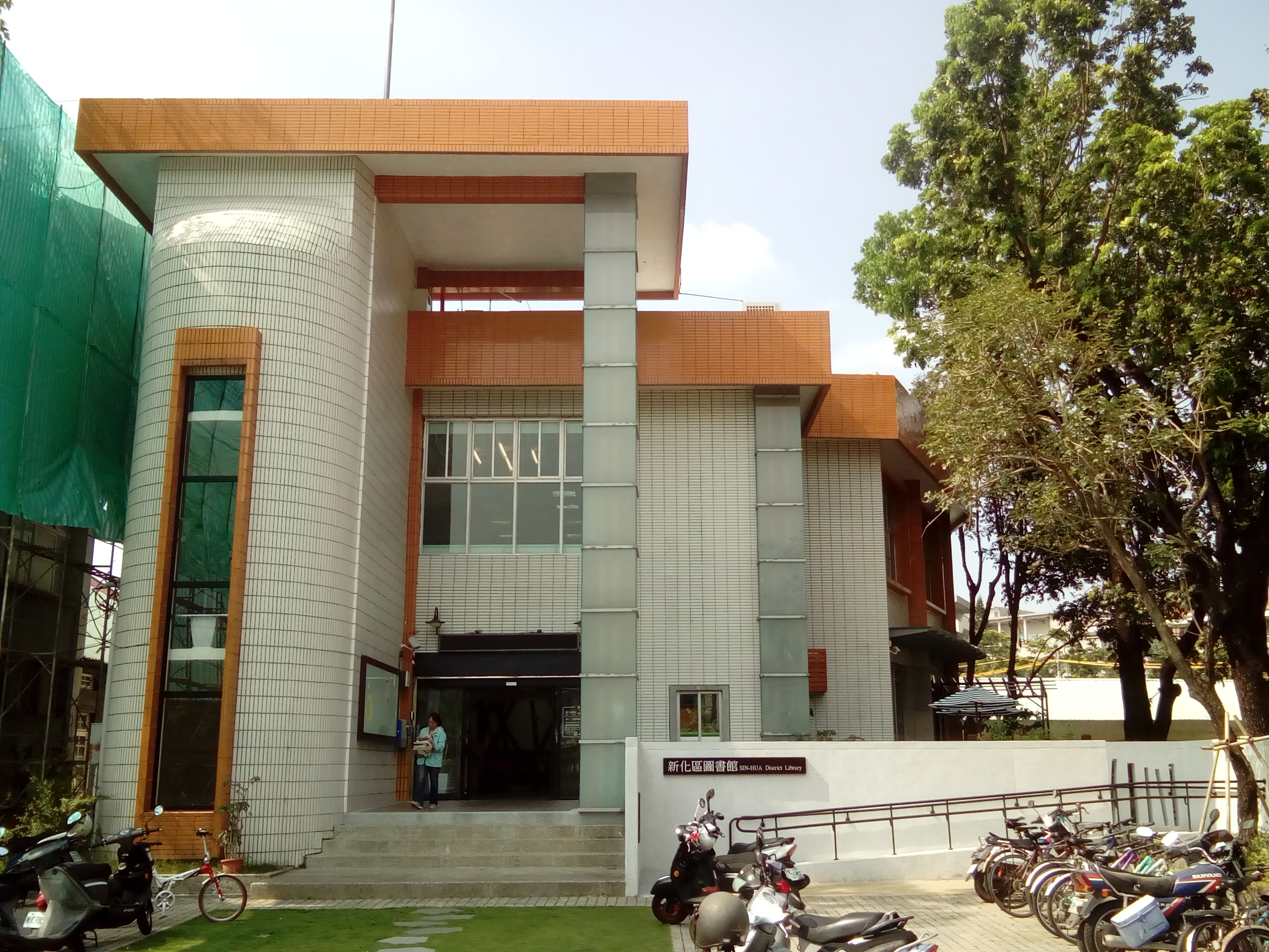 臺南市新化區圖書館